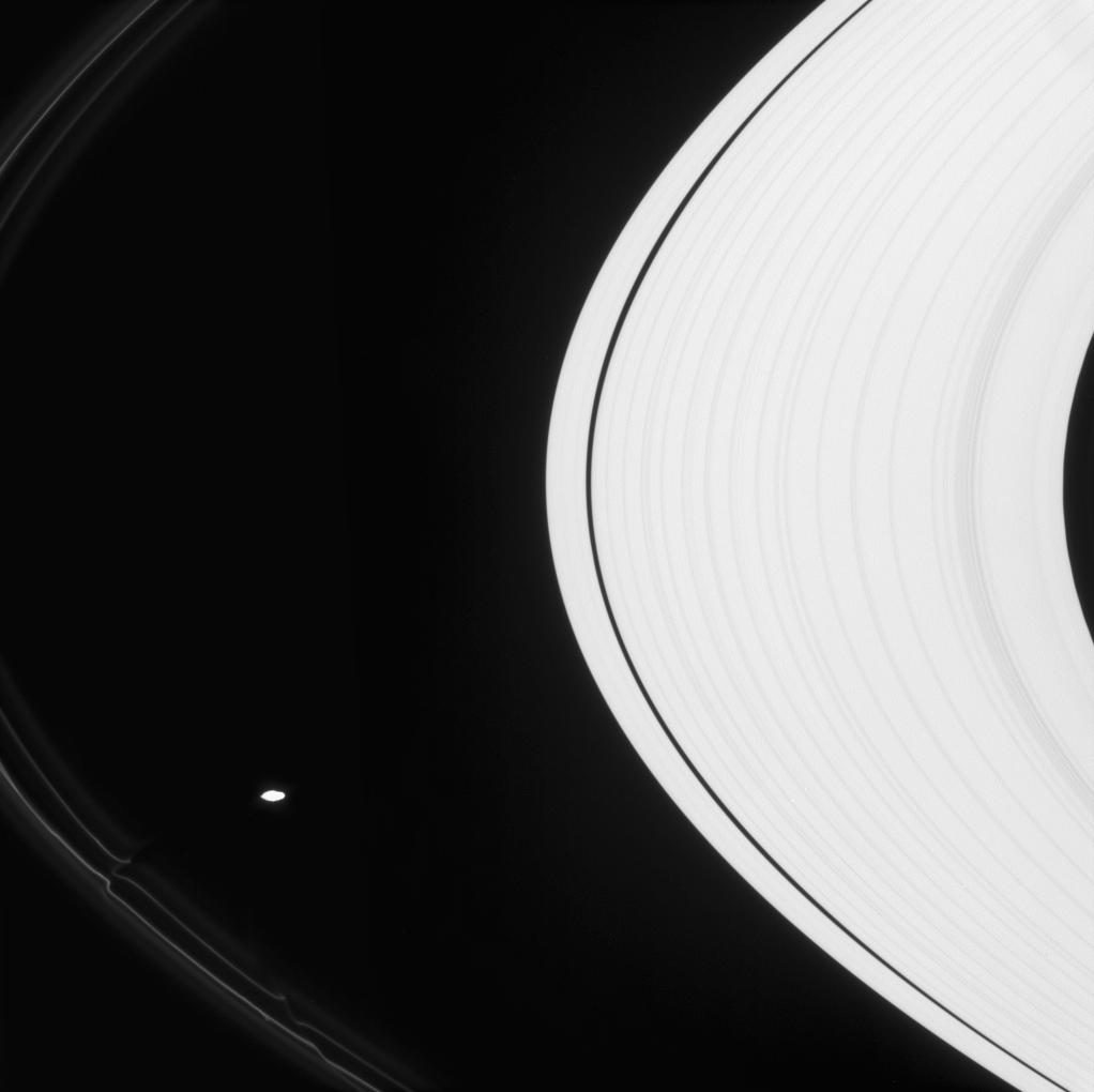 PIA09909: The Ringsmith Original Caption Released with Image: Prometheus tugs icy particles from the F ring into fanciful shapes like ropes of glowing neon. Although Prometheus (86 kilometers, or 53 miles across) is overexposed here, the moon's irregular outline is quite easy to see. This view looks toward the sunlit side of the rings from about 7 degrees below the ringplane. The image was taken in visible light with the Cassini spacecraft narrow-angle camera on April 22, 2008. The view was obtained at a distance of approximately 1 million kilometers (652,000 miles) from Saturn. Image scale is 6 kilometers (4 miles) per pixel.